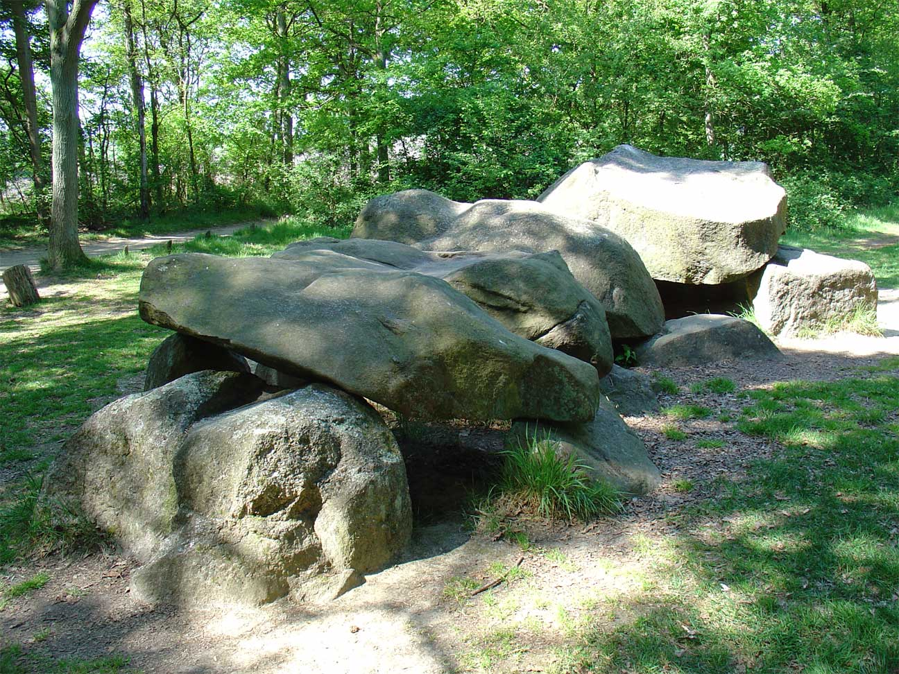 Hunebed D25 nabij Bronneger